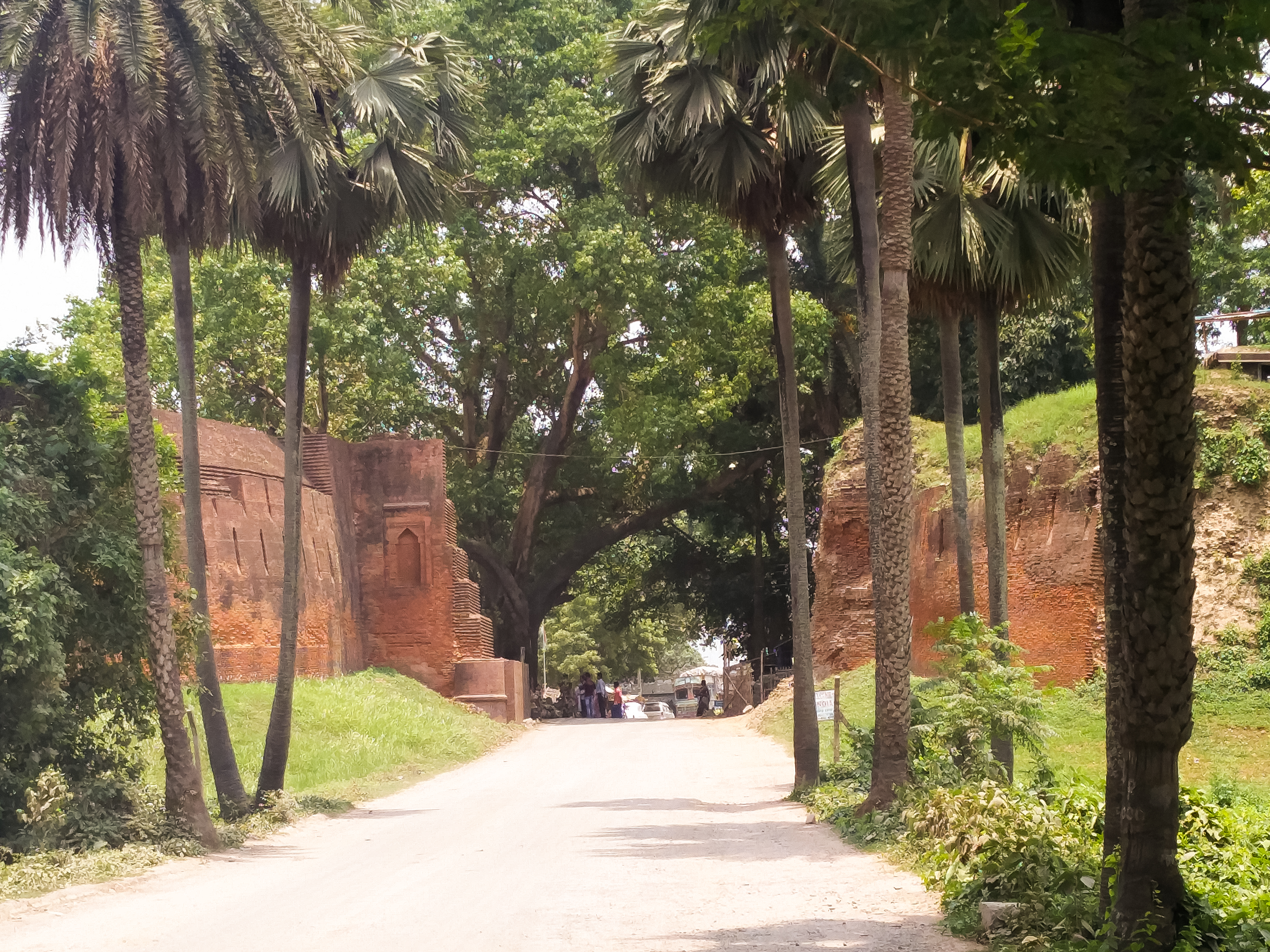 গৌড়স্থ দুর্গ প্রাচীর (বাংলাদেশ অংশ)